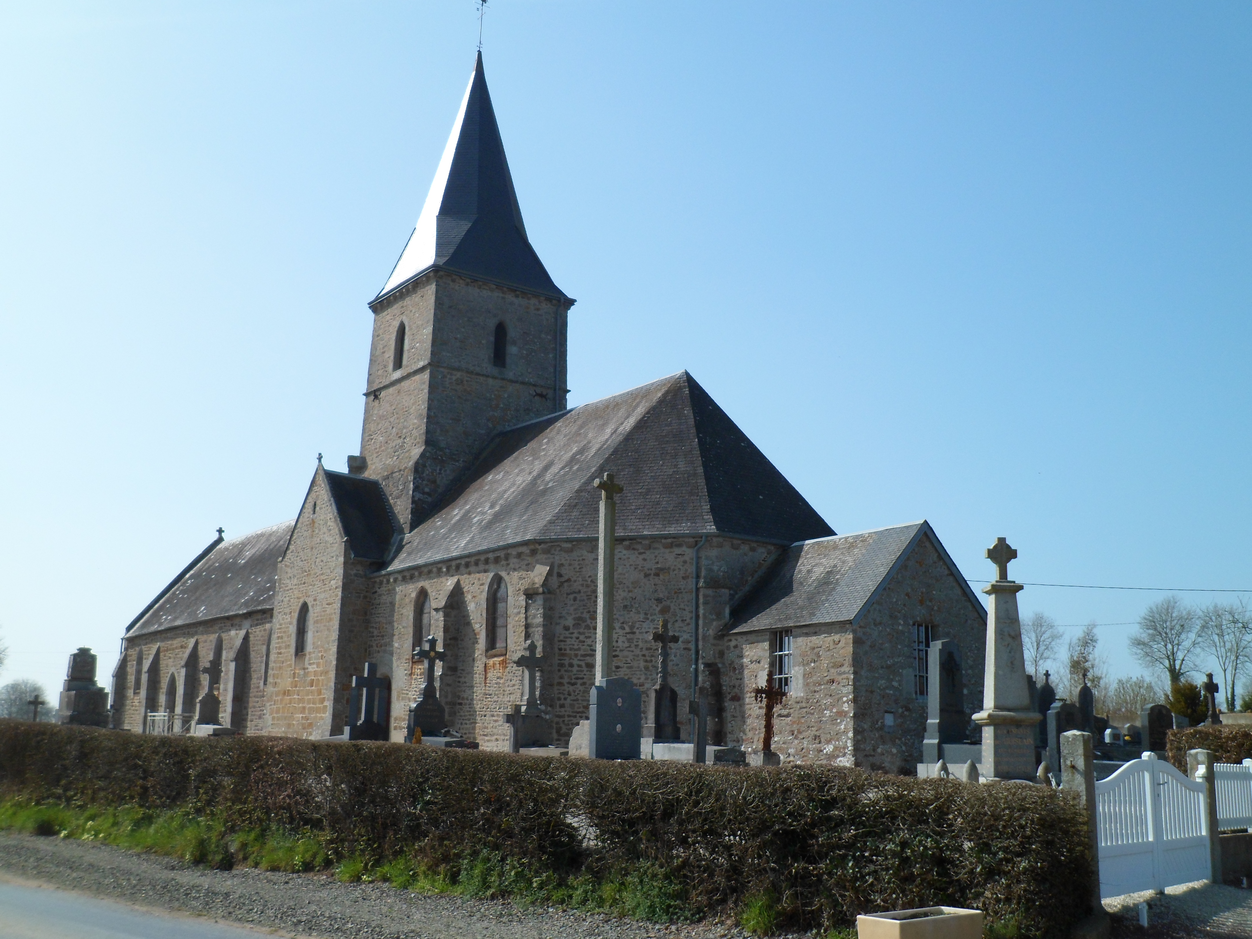 Église Saint-Pierre du Guislain